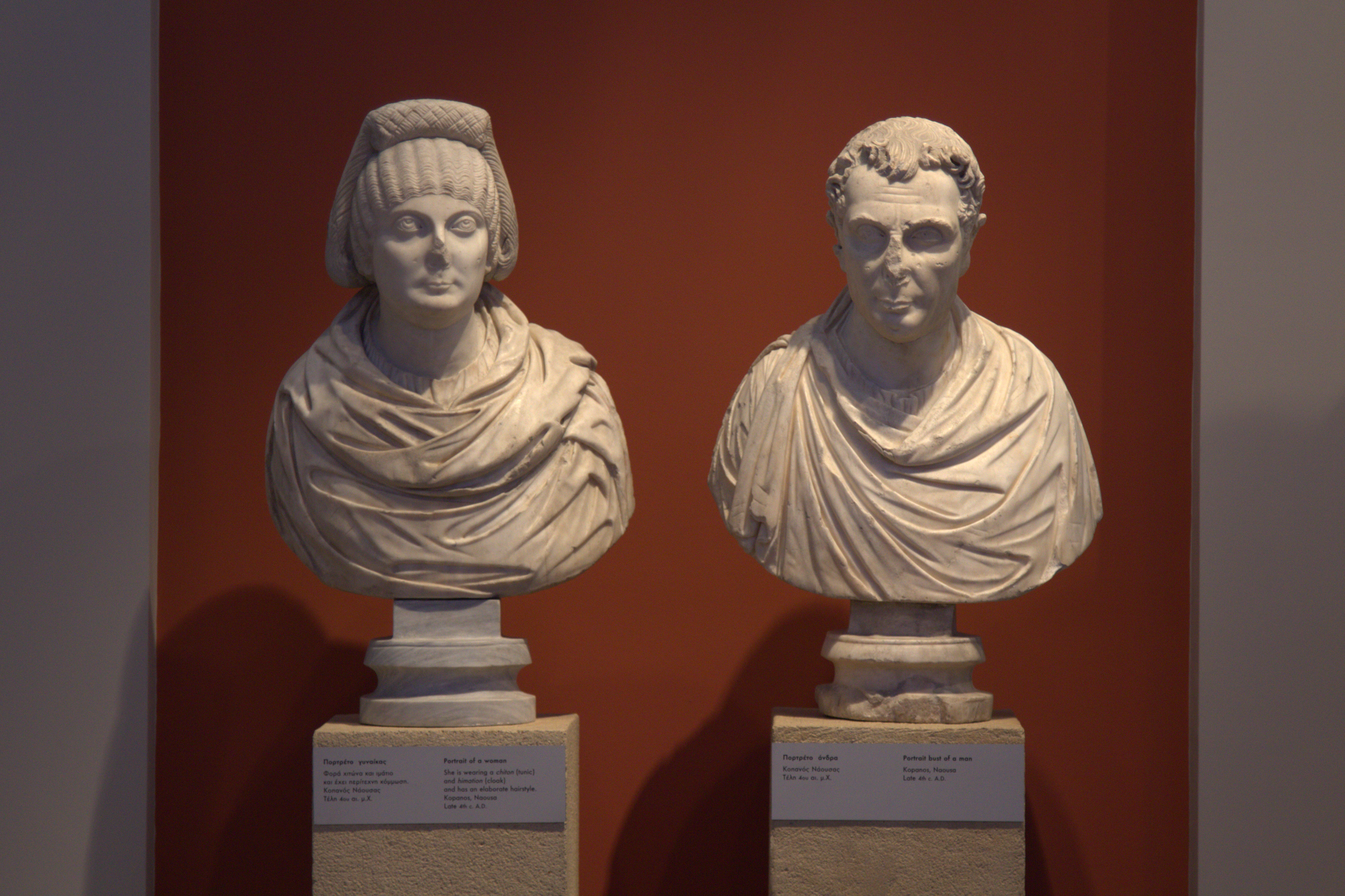 Αρχαιολογικό Μουσείο Θεσσαλονίκης.